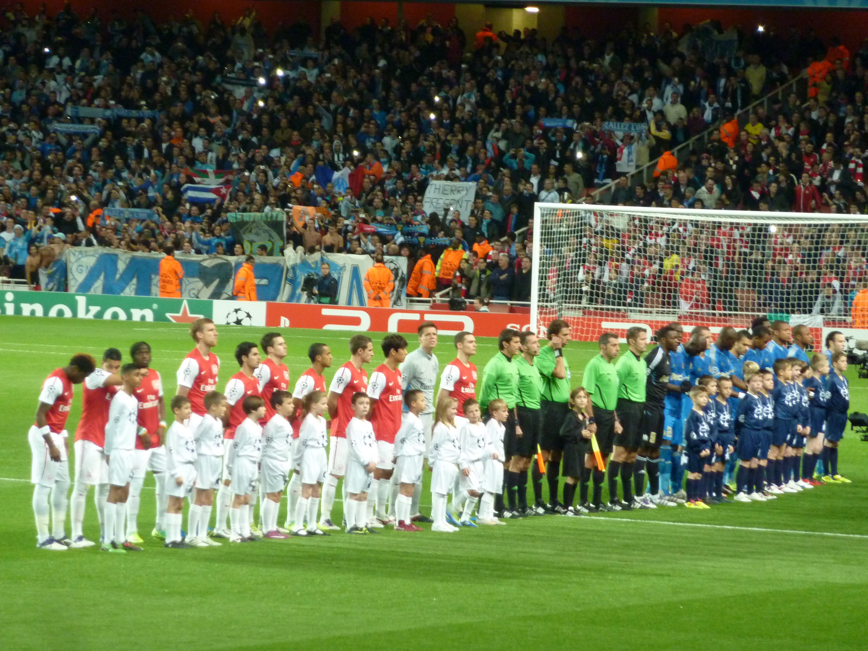 UEFA Champions League 2011/12 - Match Day 4: Arsenal FC v Olympique de Marseille - Emirates Stadium, London.